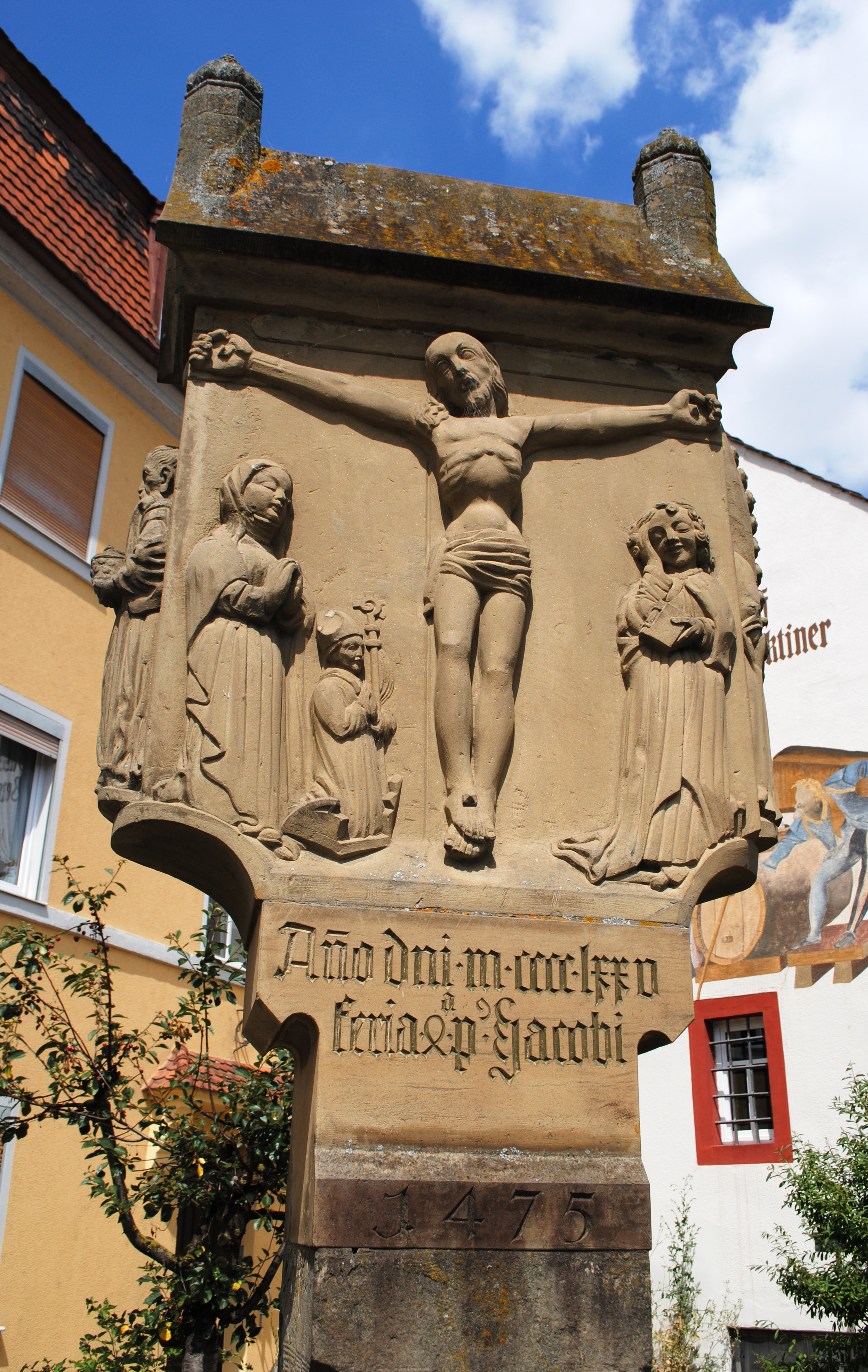 Vorderseite, Bildstock, Münsterschwarzach